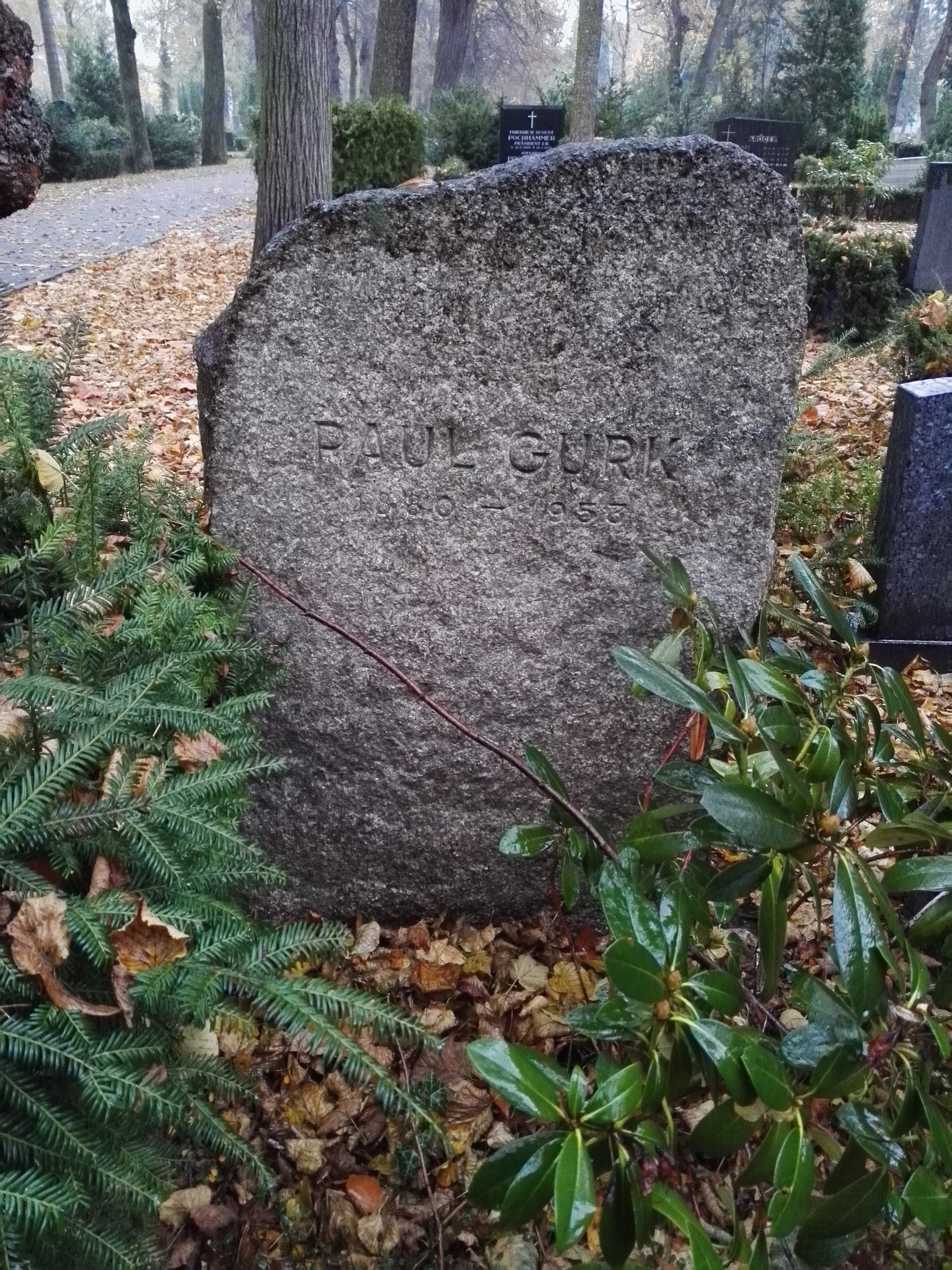 Grab von Paul Gurk auf dem Dom-Friedhof II in Berlin-Mitte; ehemaliges Ehrengrab der Stadt Berlin